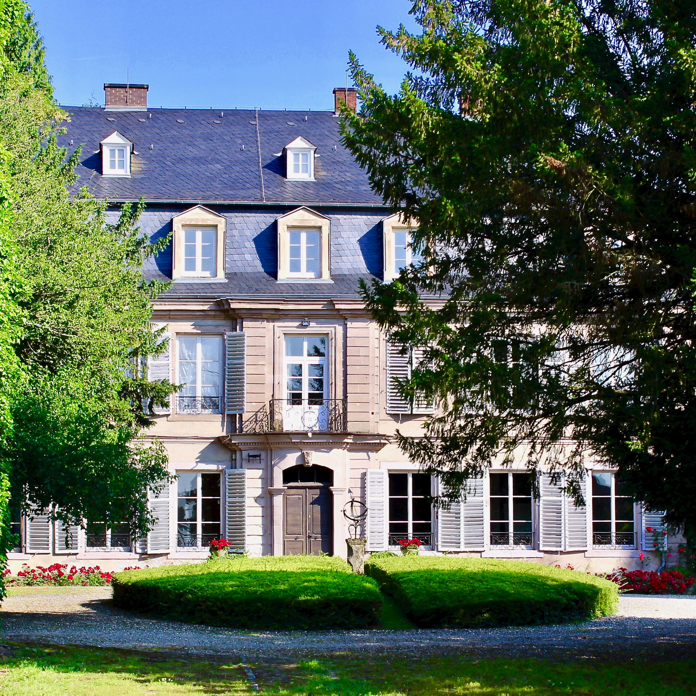 Teilansicht des Herrenhauses des Schlosses zu Fremersdorf, eines Ortsteils von Rehlingen-Siersburg im Landkreis Saarlouis.